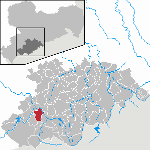 Lauter/Sa. im Erzgebirgskreis, Sachsen